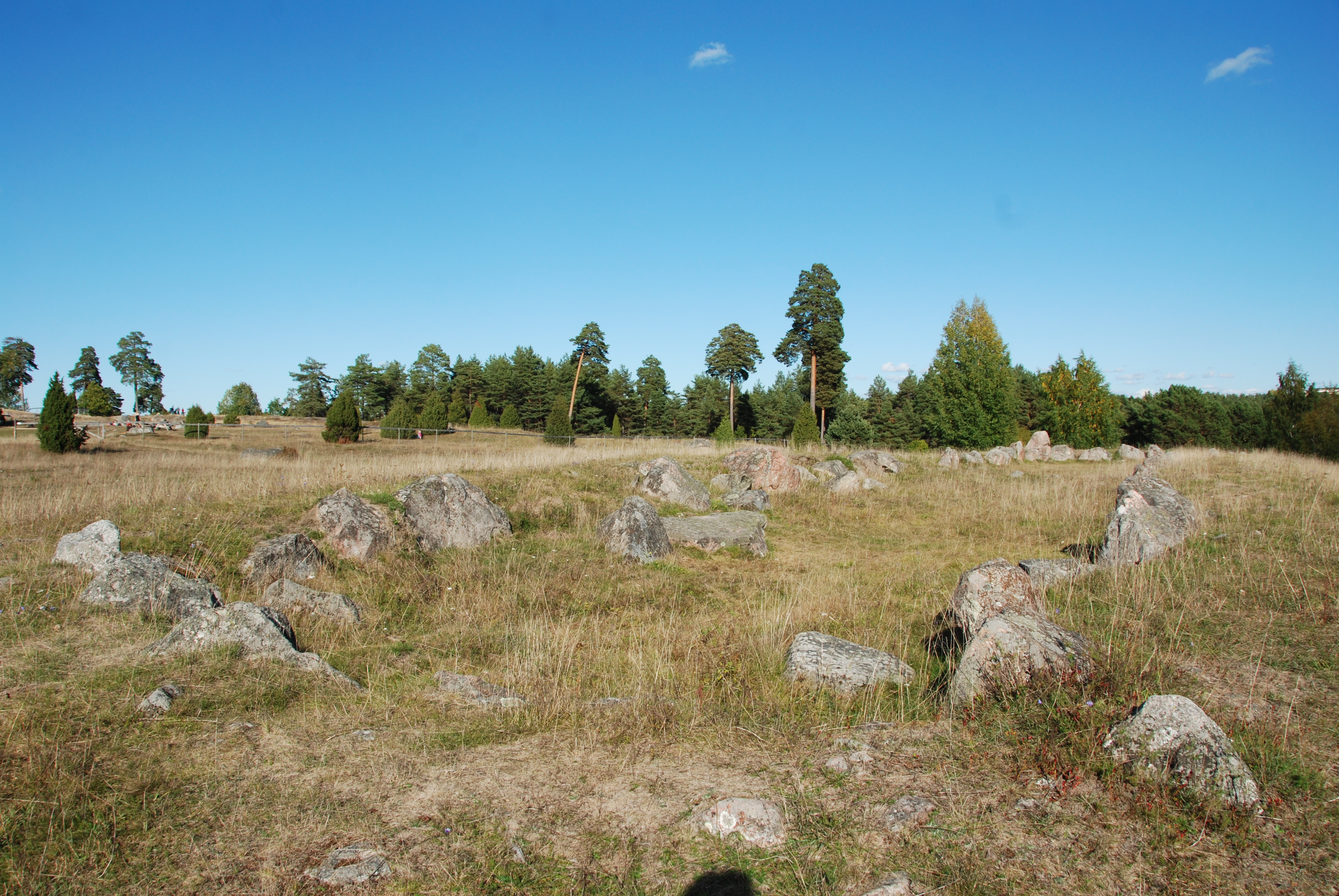 1) Kung Björns kyrka (Uppsala 358:1)